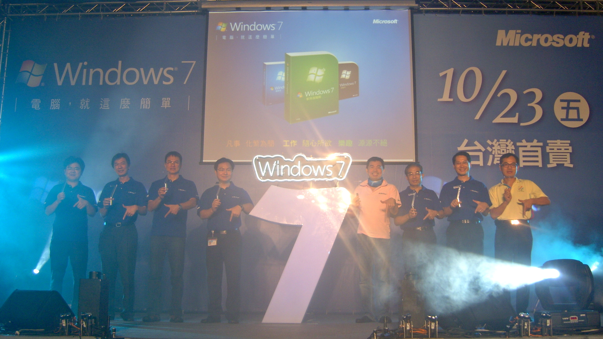 Windows 7 Launch in Taiwan.